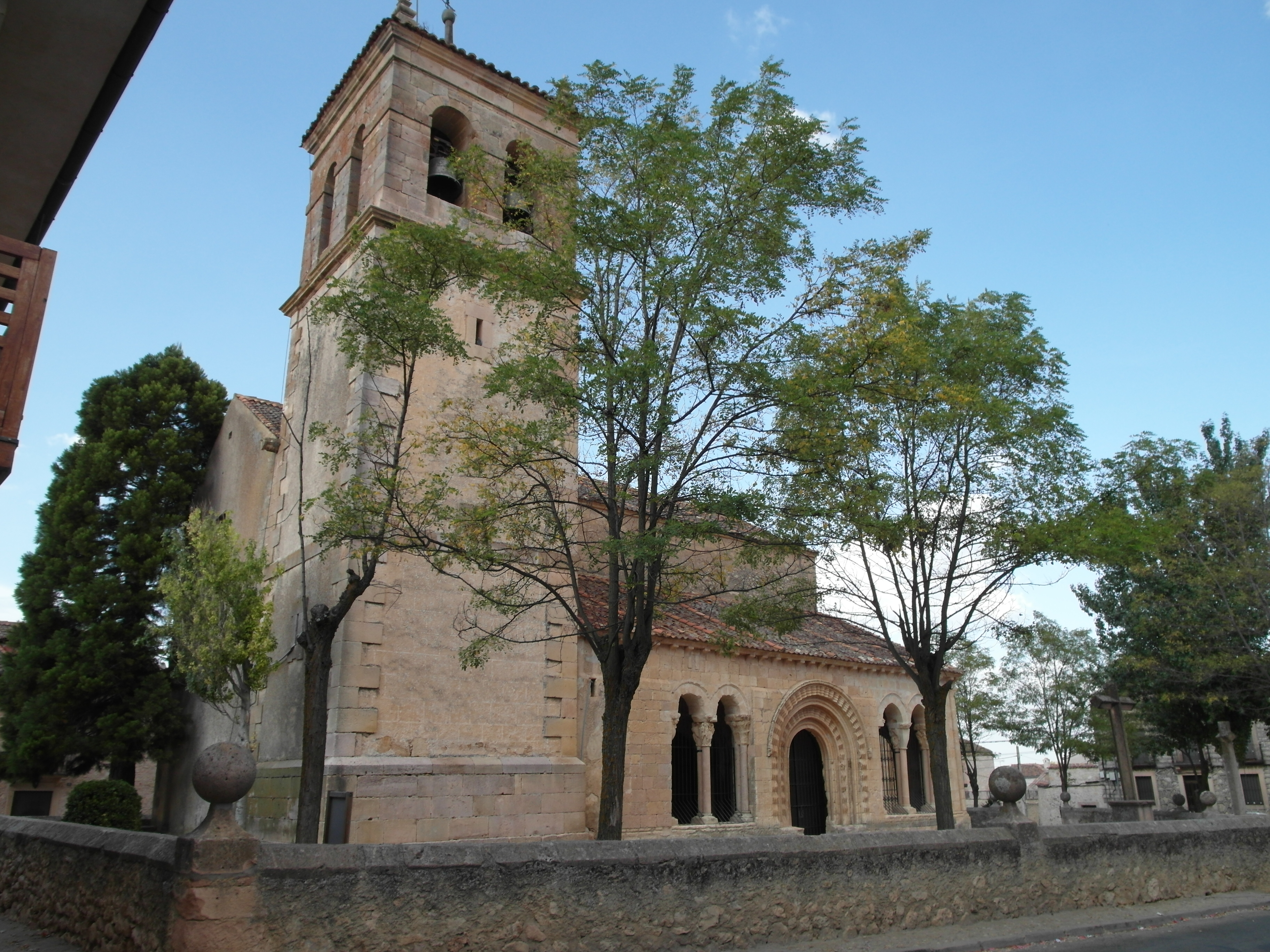 Iglesia de San Pedro, San Pedro de Gaíllos, Segovia.